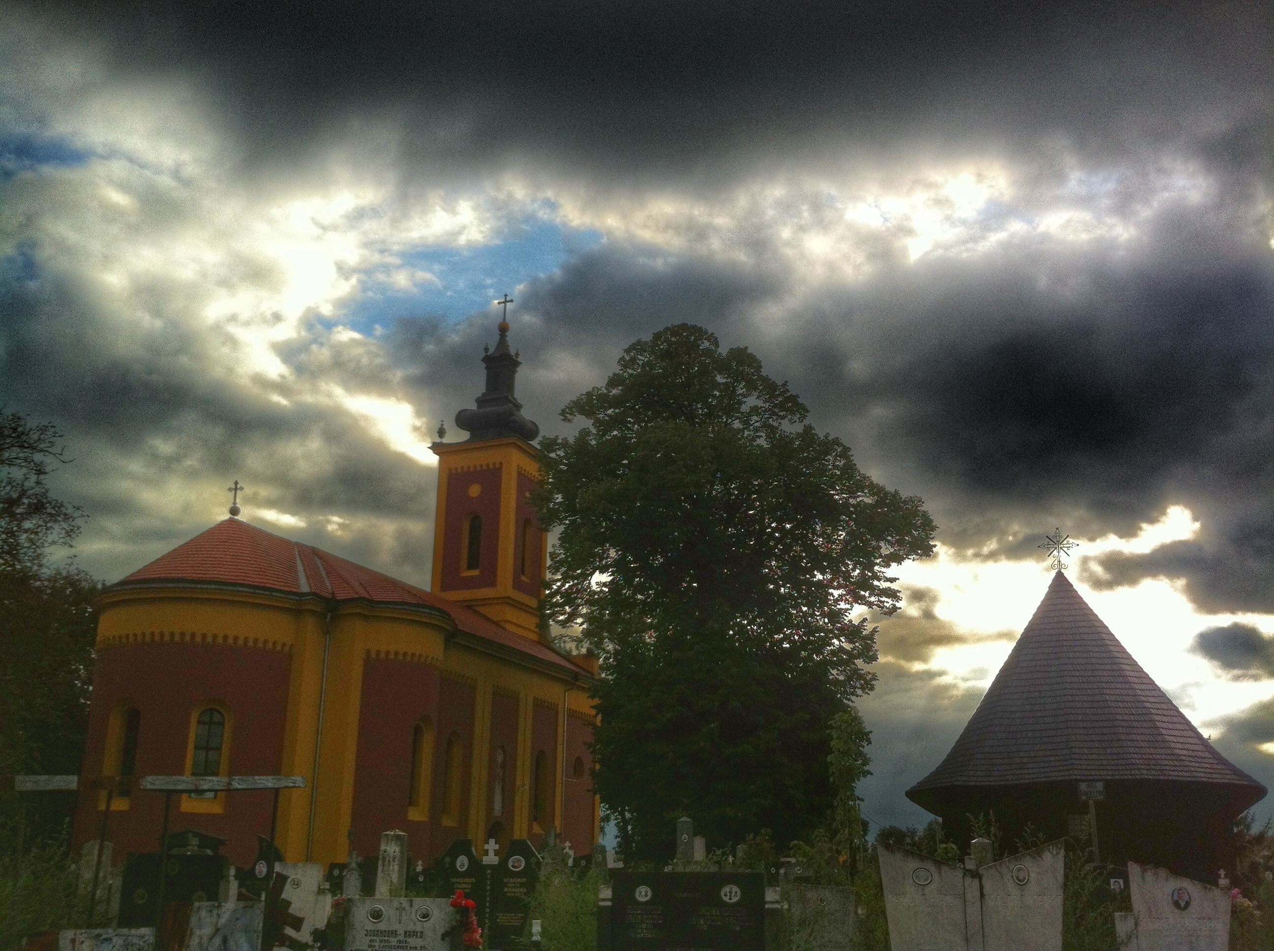 Српски (ћирилица): Грађена у периоду 1890-4.године. Налази се у пространој порти заједно са старом црквом брвнаром саграђеном 1831.године.